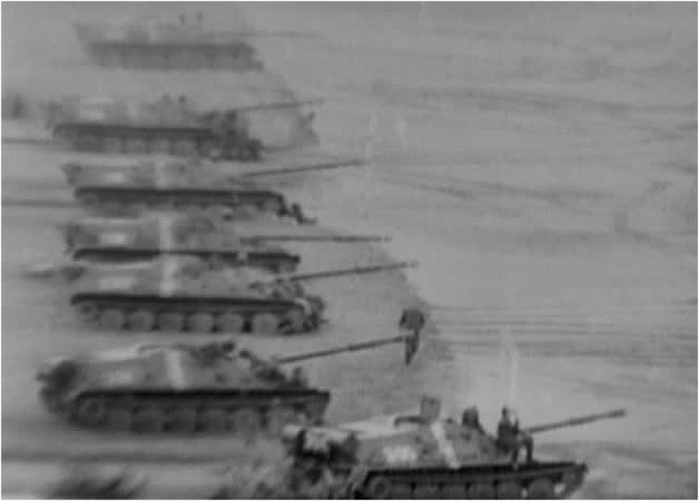 Sovětské okupační síly.